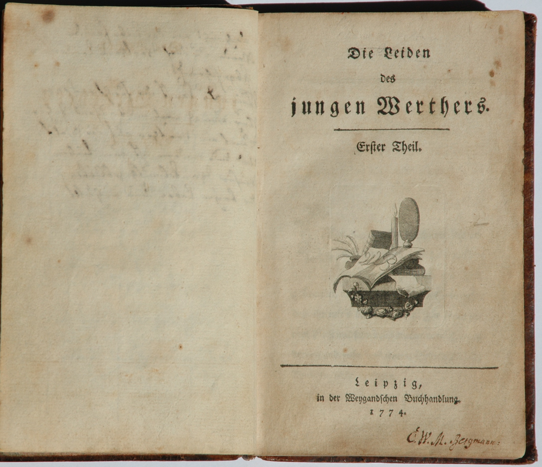 Johann Wolfgang von Goethe (1749–1832) Description German poet Date of birth/death28 August 174922 March 1832Location of birth/deathFrankfurt am Main, GermanyWeimar, GermanyAuthority control VIAF: 24602065 LCCN: n79003362 GND: 118540238 SELIBR: 56318 BnF: cb11905269k ULAN: 500014761 ISNI: 0000 0001 2099 9104 WorldCat WP-Person Die Leiden des jungen [Werther] Werthers . Erster Theil. / Zweyter Theil. [in 1 Bd.]Leipzig, in der Weygandschen Buchhandlung. 1774. 224 Seiten. Erste Auflage, Bibliographie: Hagen 80 D1 alpa. - Kupfervignette auf Titel 1: Postament mit vorgelagerter Blumengirlande, darauf Bücher, ein aufgeschlagenes Heft mit den Buchstaben WB, Tintenfass mit Federn und eine brennende Kerze vor Lichtschirm (der Kupfer laut Hagen von Oeser). - Zur Identifikation des Druckes Hagen D1 alpha: Ohne das Druckfehlerverzeichnis auf Seite 224, dafür eine Sense und eine geflügelte Sanduhr in Holzdruck. Die Fehler des Druckes Hagen 80 D1 hier korrigiert. Doppeldruck laut Hagen [Die Drucke von Goethes Werken (1983), S. 111] - ebenso selten wie der nicht korrigierte Erstdruck vom selben Jahr.